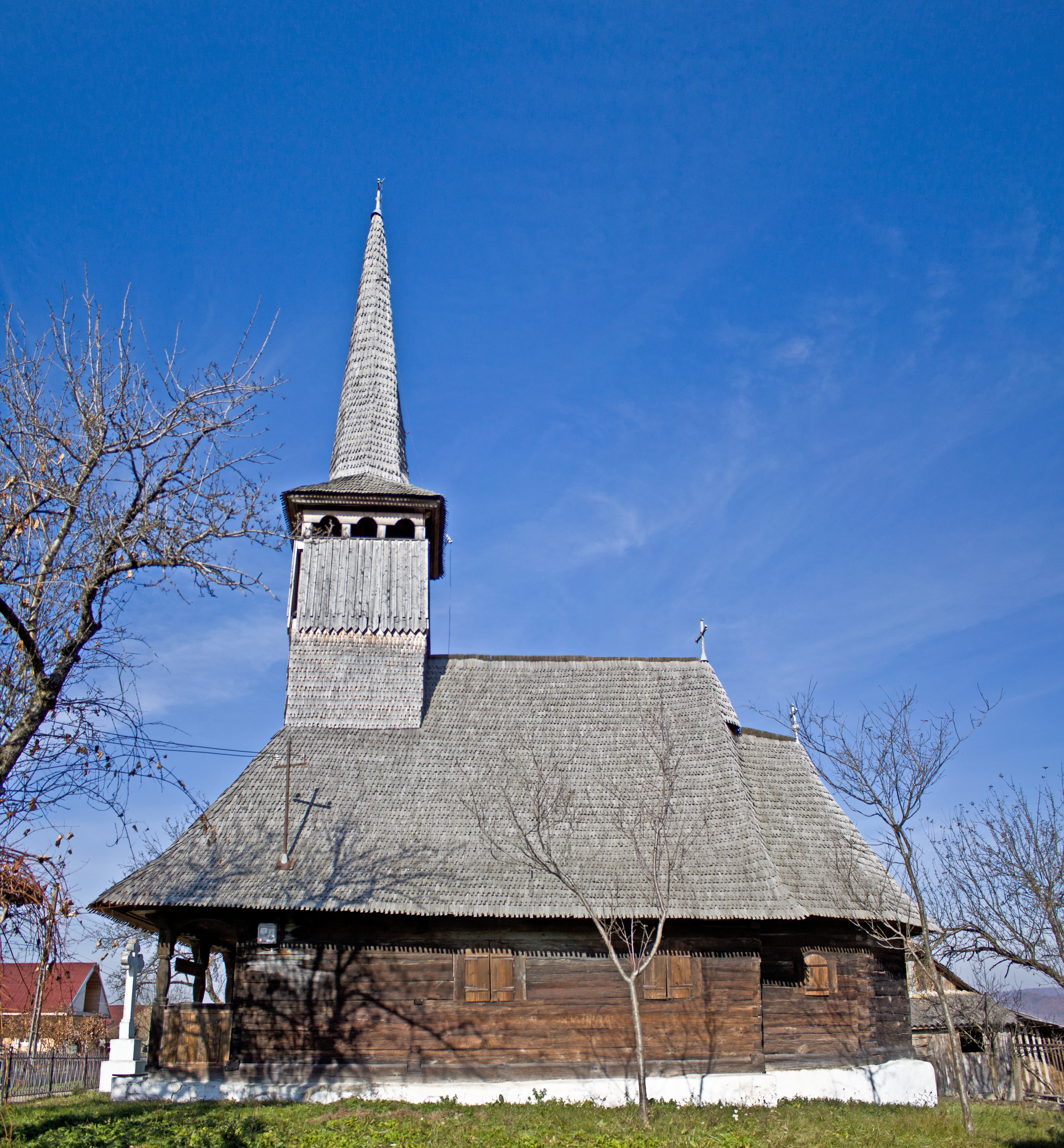 Szent Mihály és Gábriel arkangyalok fatemplom, 18. század (Csömény) Biserica de lemn din Podişu, judeţul Sălaj.